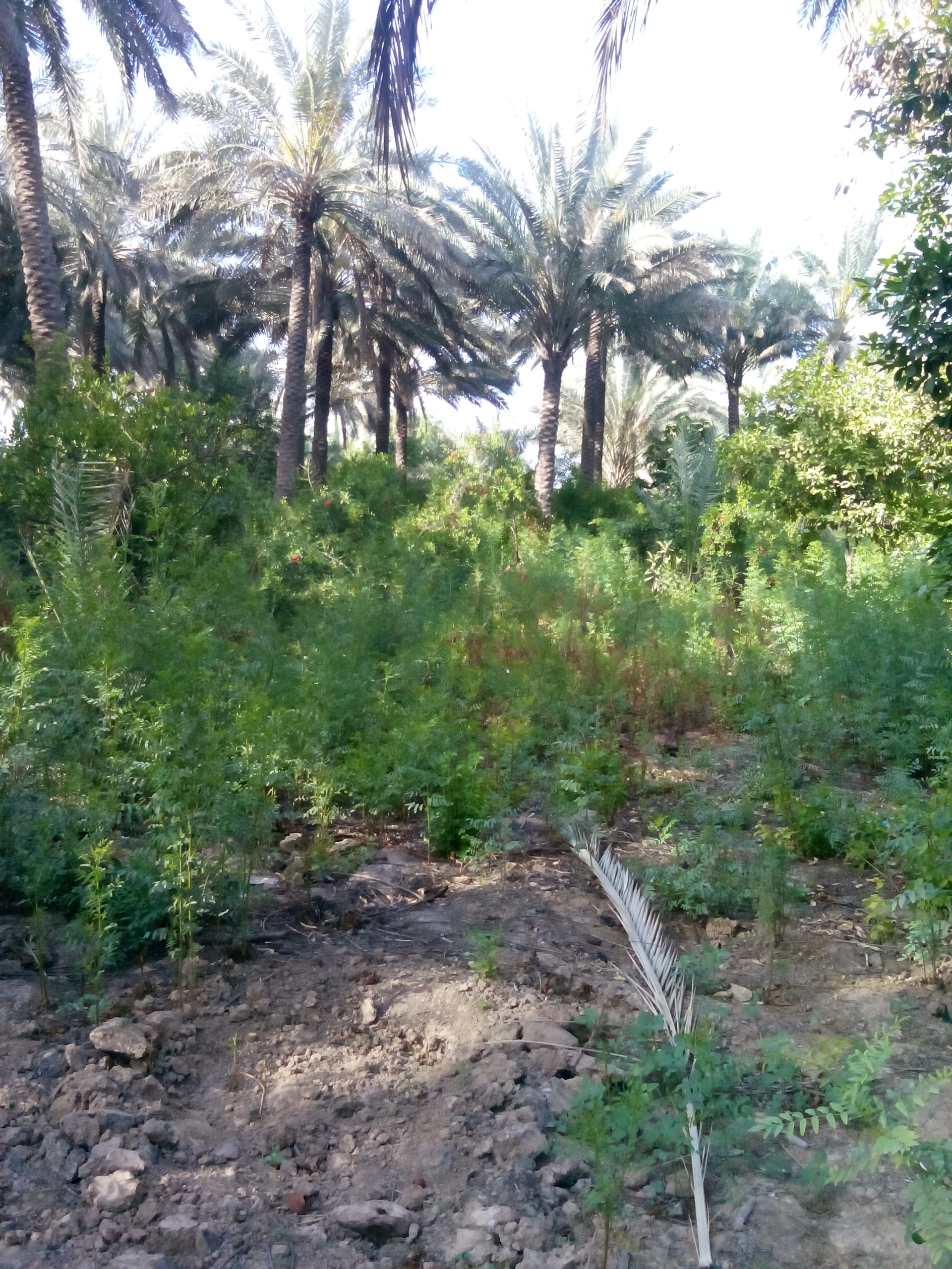 أشجار نخيل ورمان وحمضيات في بستان في ناحية المحمودية (الأسود) والتابعة لمدينة الخالص شرق العراق